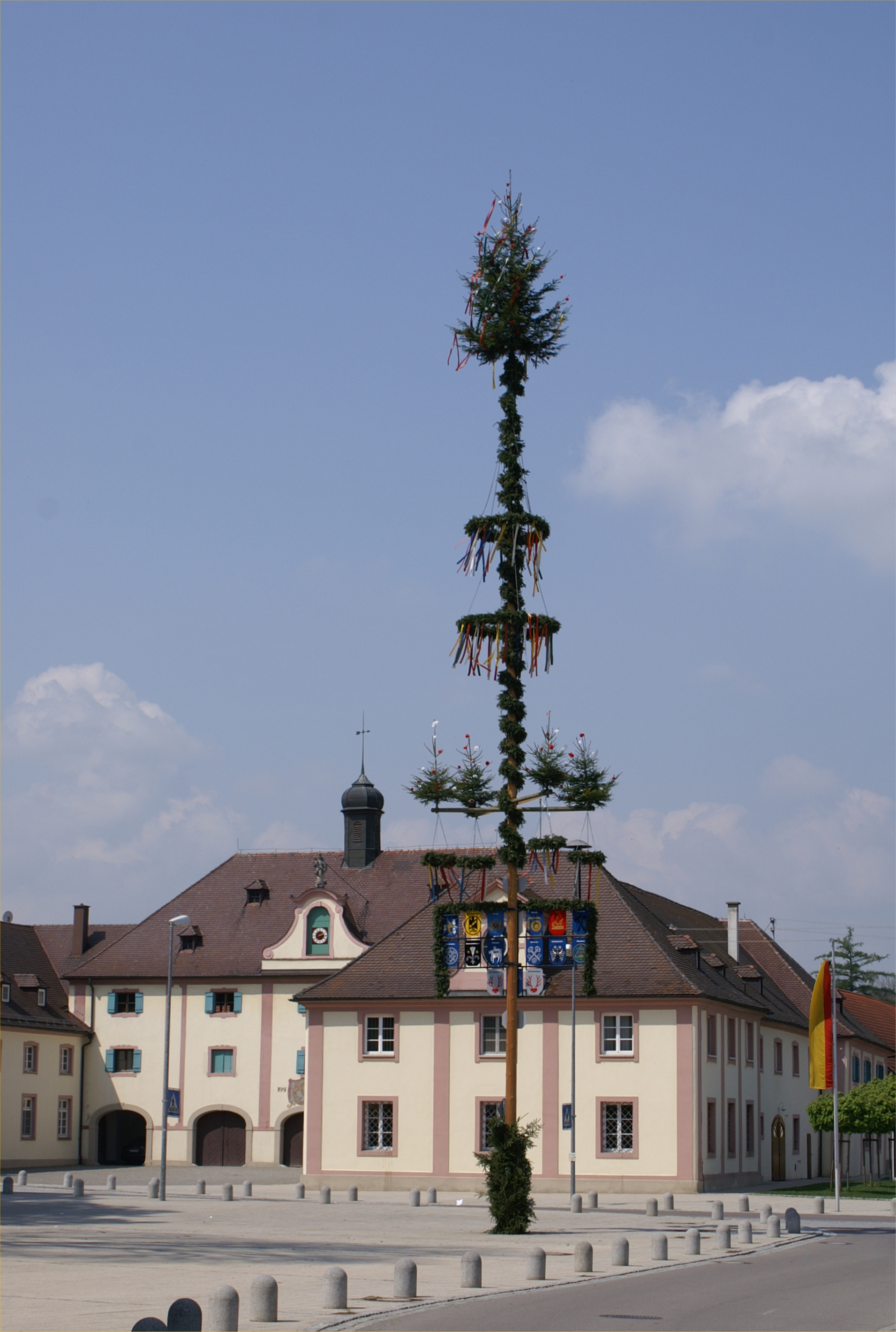 Kanzleigebäude in Oberdischingen, Alb-Donau-Kreis